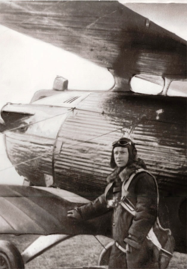 Komentarz wnuka: Załączam też zdjęcie Dziadka przy samolocie. Jest to francuski Bréguet XIXB2, który był na wyposażeniu 2 Pułku Lotniczego od 1929 roku i był na wyposażeniu 21 Eskadry Liniowej. W eskadrach szkolnych i szkołach lotniczych przetrwały do 1939 roku, kiedy nie miały już większej wartości bojowej. Większość została zbombardowana na lotniskach podczas kampanii wrześniowej . Przypuszczam, że fotografia pochodzi z czasów 2. Pułku Lotniczego i wygląda na retuszowaną w przedwojennym zakładzie fotograficznym, stąd nieco rysunkowy wygląd samolotu